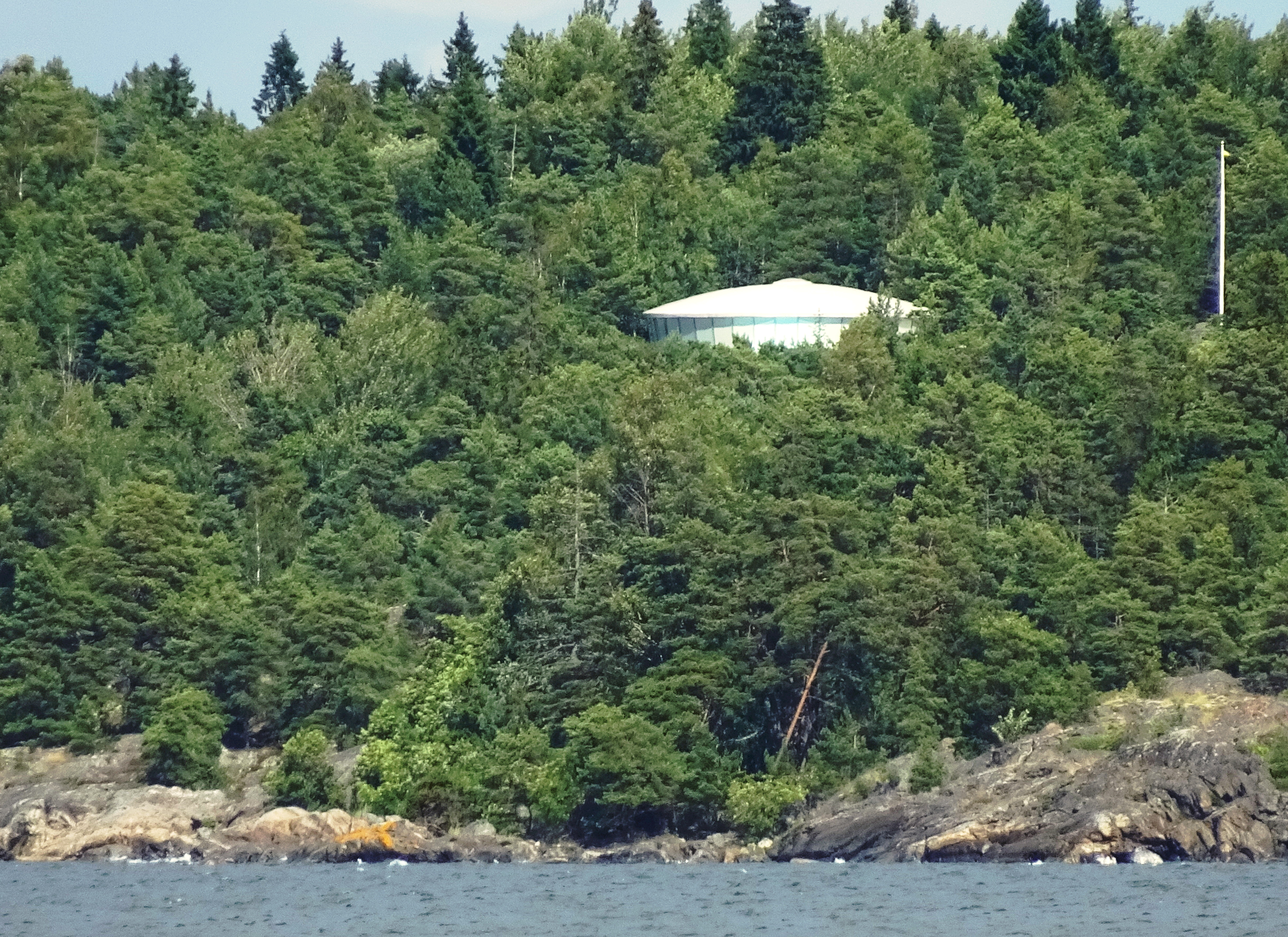 Villa Spies sedd från Reveluddens naturreservat